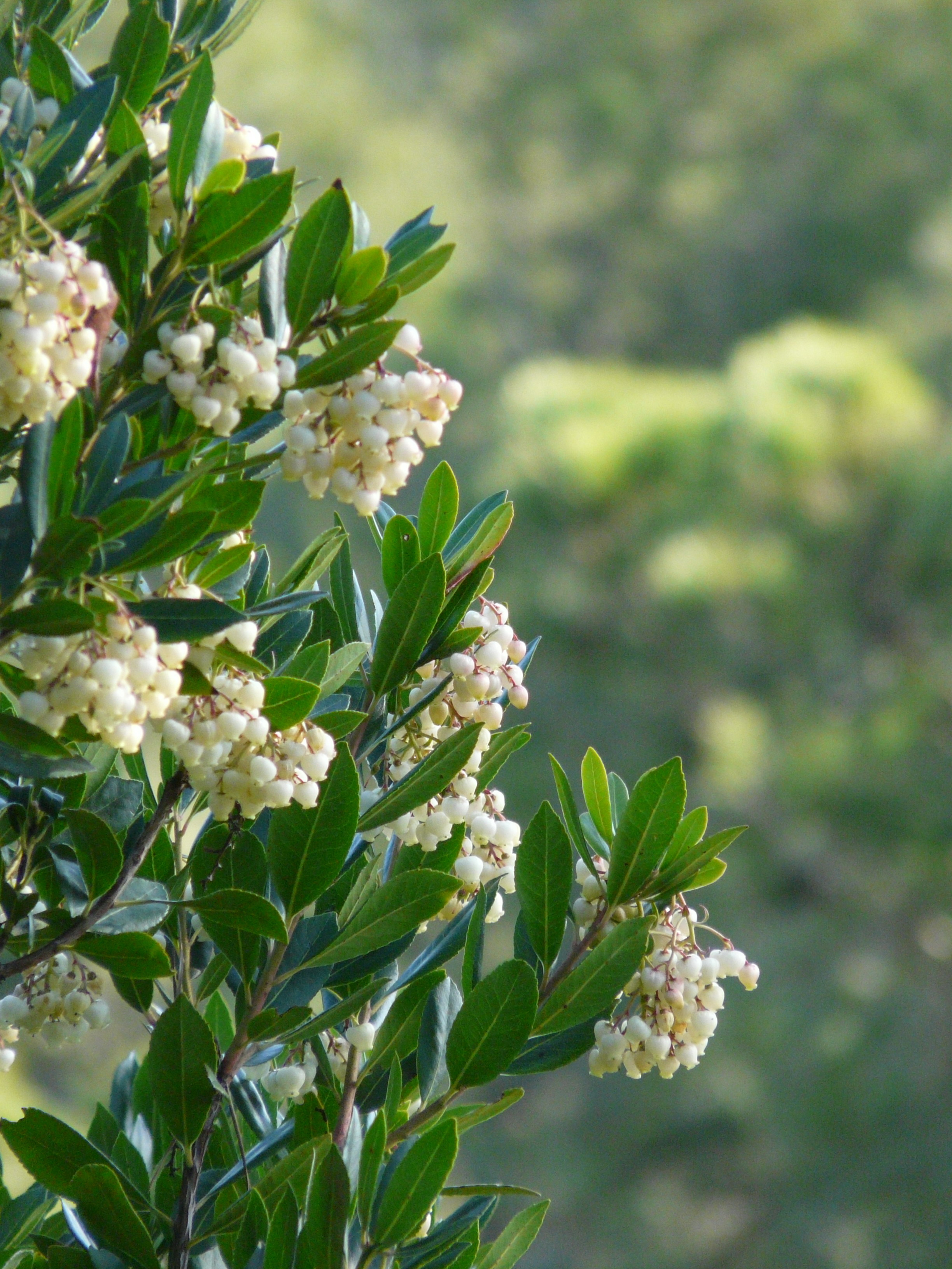 Cirerer d'arboç (Arbutus unedo) florit a la serra de Collserola, a l'extrem superior de la vall de Sant Just a sota el coll de Can Cuiàs.